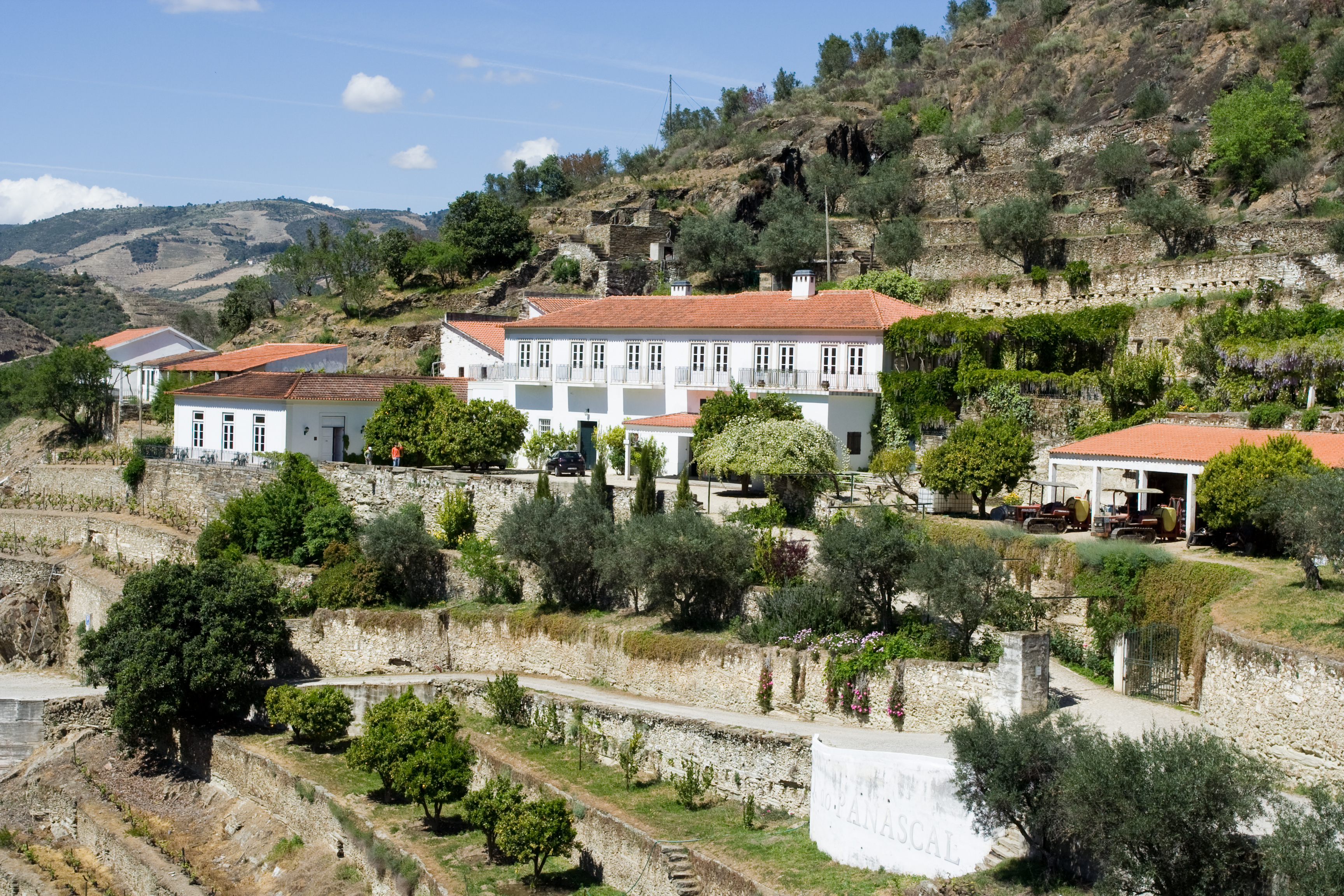 Quinta do Panascal (Fonseca)